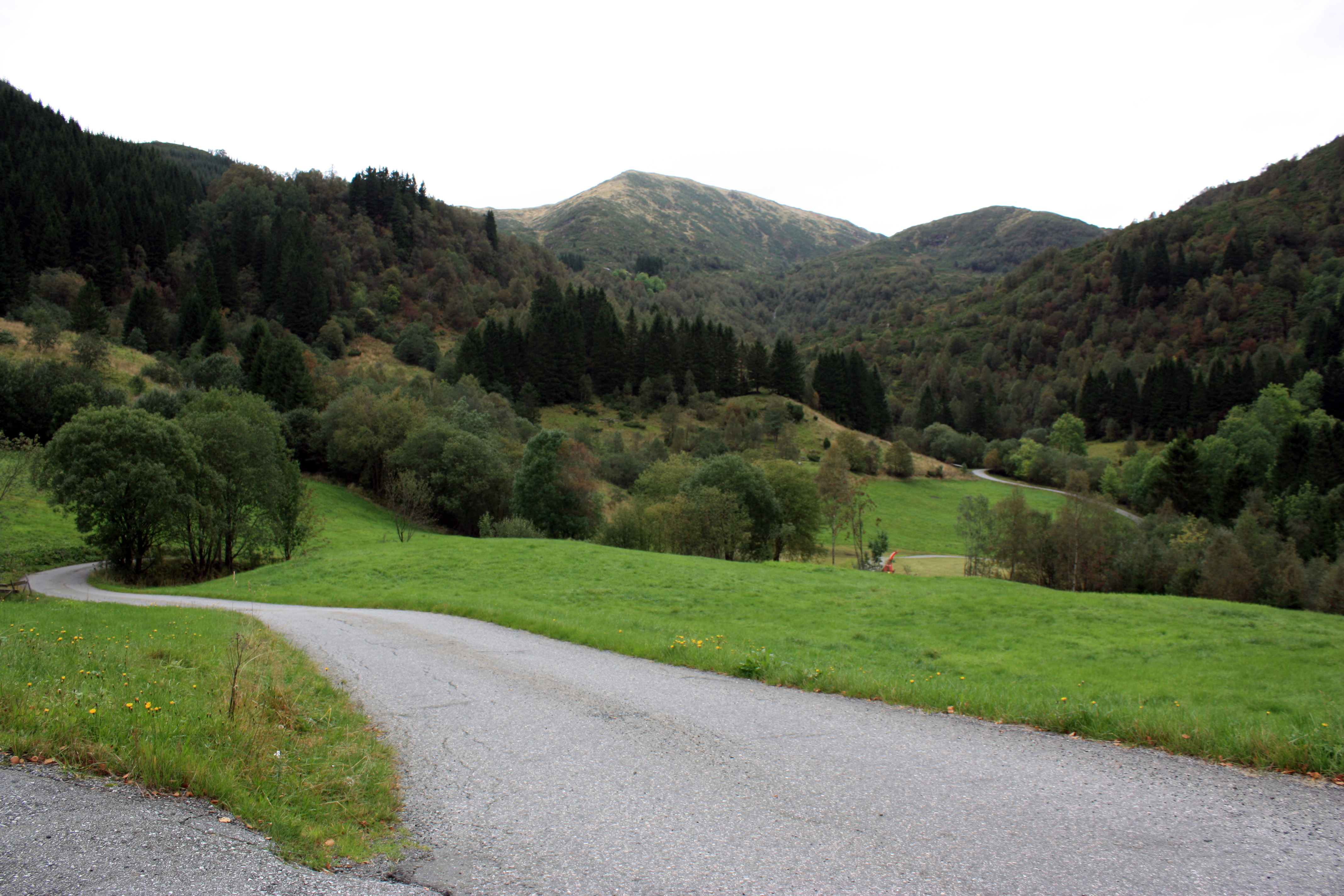 Øvstebøvegen, Fana, Bergen.